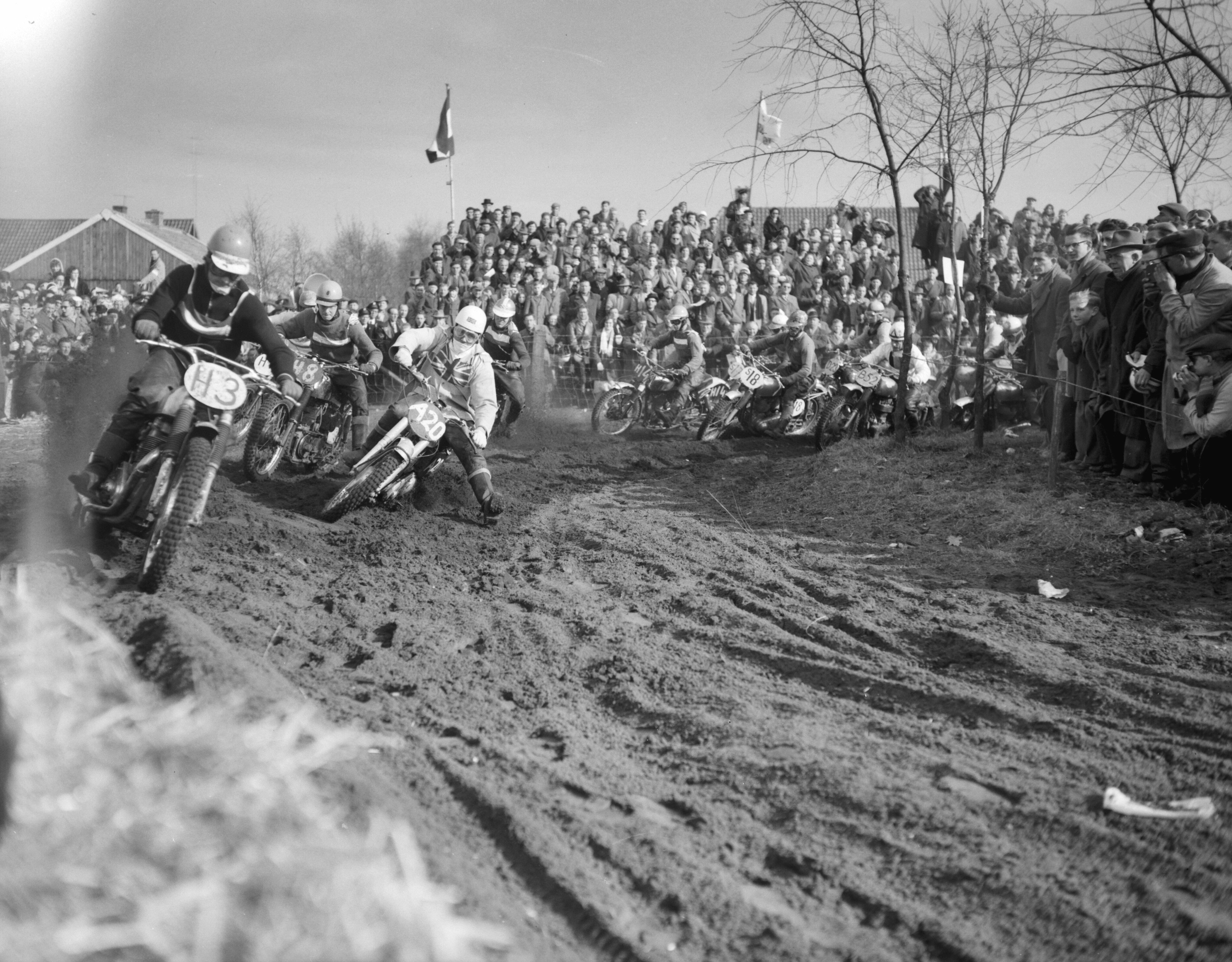 Collectie / Archief : Fotocollectie Anefo Reportage / Serie : [ onbekend ] Beschrijving : H3: J. Clynch en A20 Curtis Datum : 16 maart 1958 Trefwoorden : motorcrossen Fotograaf : Rossem, Wim van / Anefo Auteursrechthebbende : Nationaal Archief Materiaalsoort : Negatief (zwart/wit) Nummer archiefinventaris : bekijk toegang 2.24.01.04 Bestanddeelnummer : 909-4097